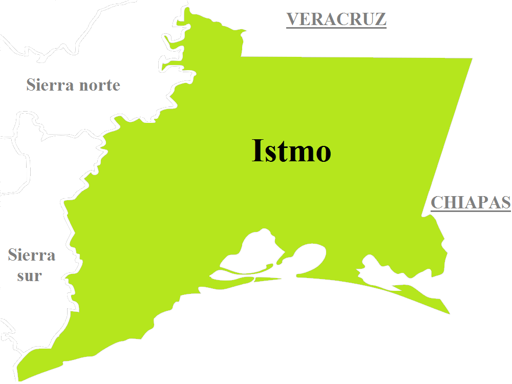 Región Istmo, una de las ocho regiones que conforman al estado mexicano de Oaxaca.